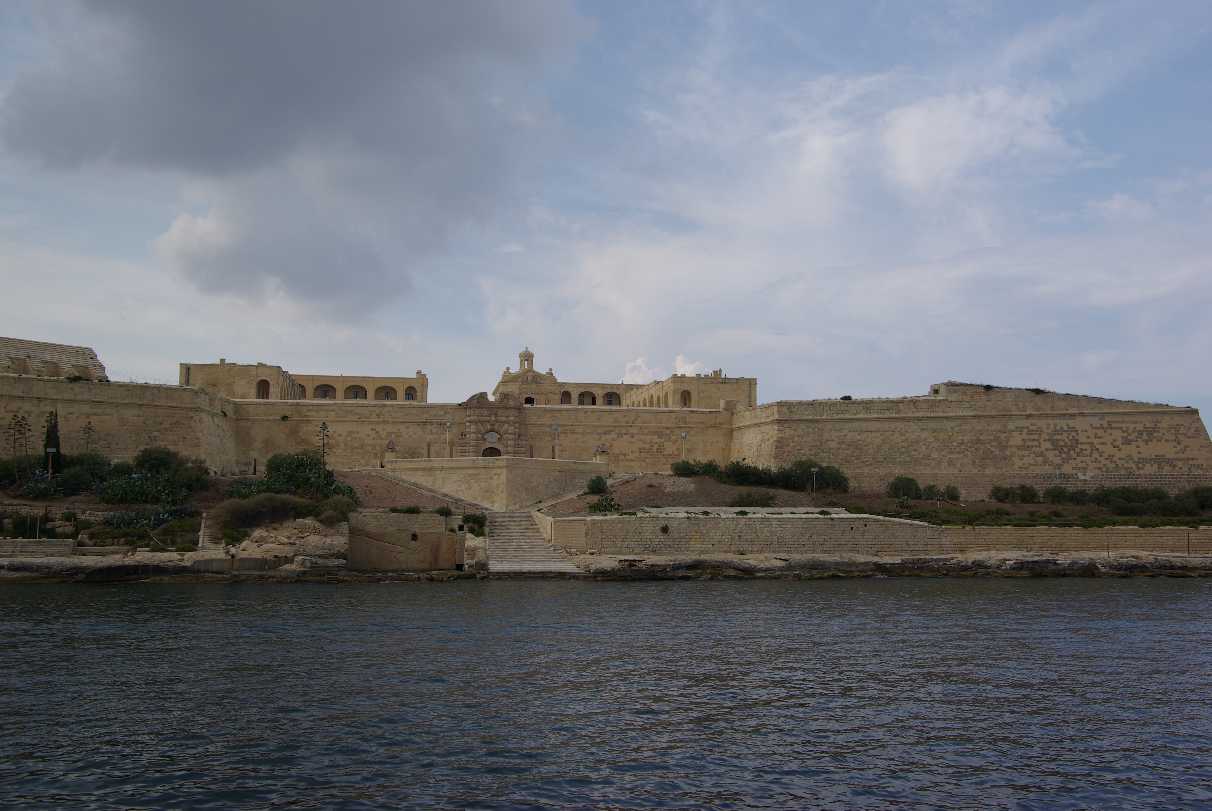 Malta, Valletta, Fort Manoel